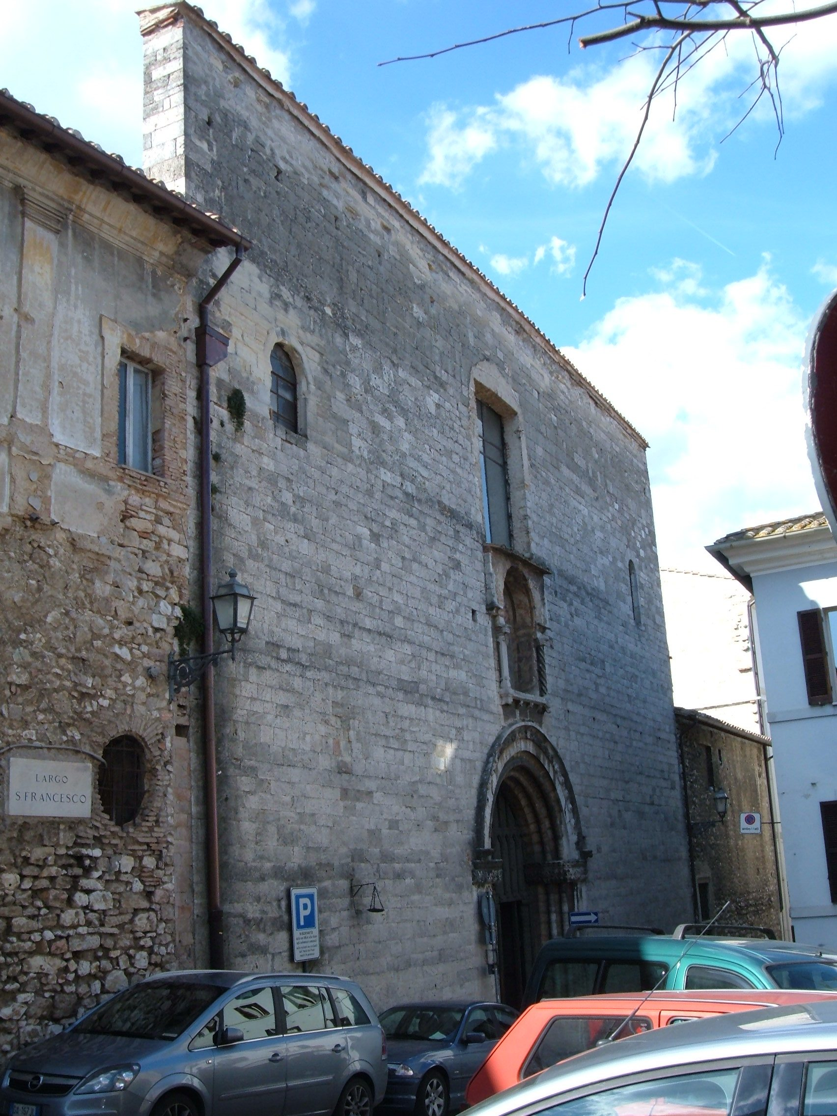 Chiesa di San Francesco, a Narni. Facciata.